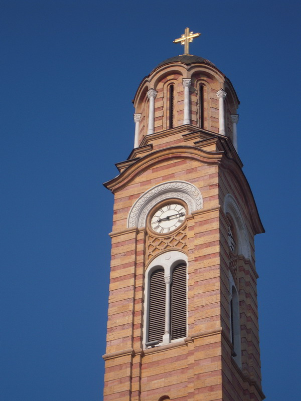 Храм_Христа_Спаситеља